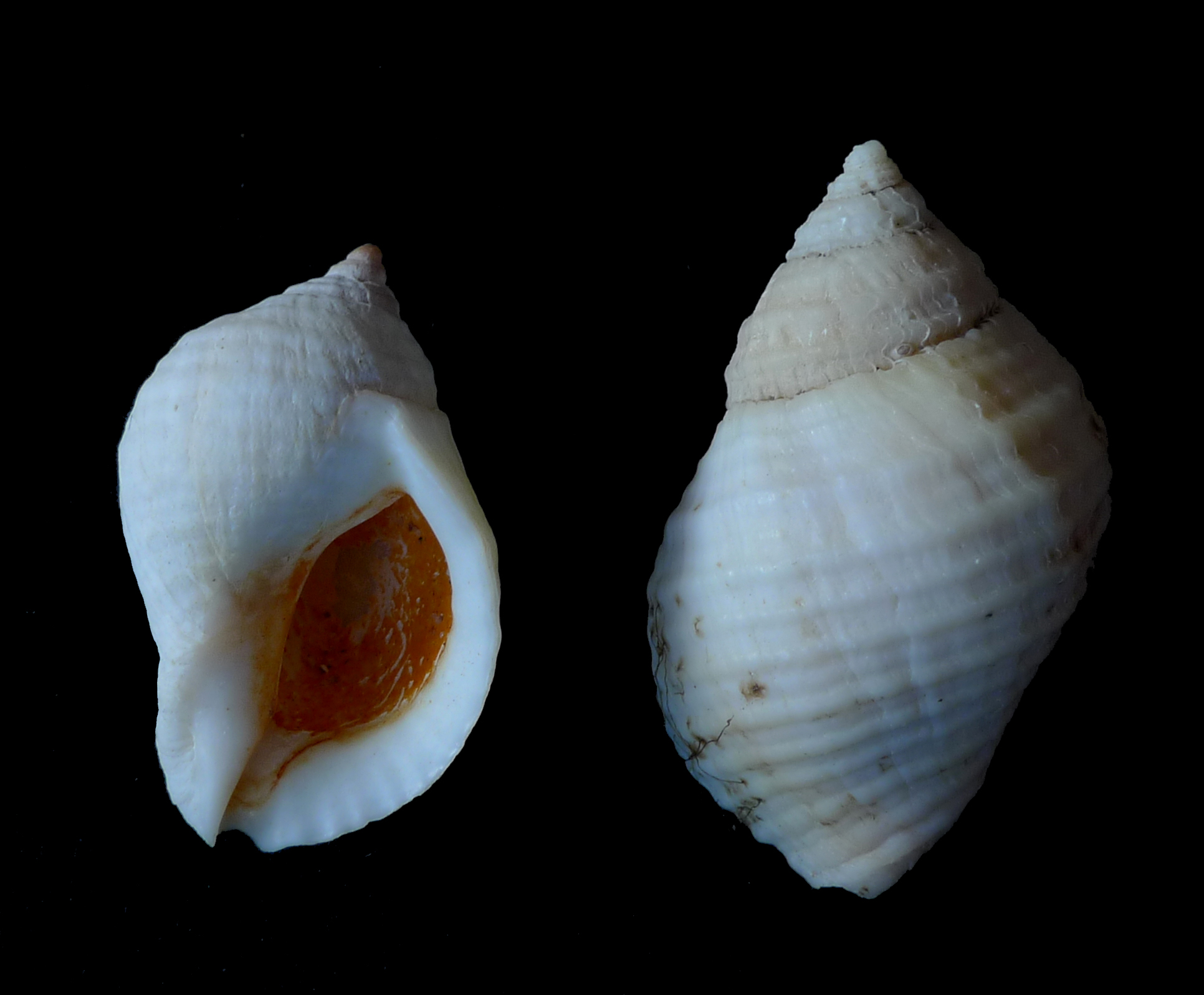 Nucella lapillus - Nordische Purpurschnecke (aus ungeschützter und halbgeschützter Lage); North-Wales/Britain